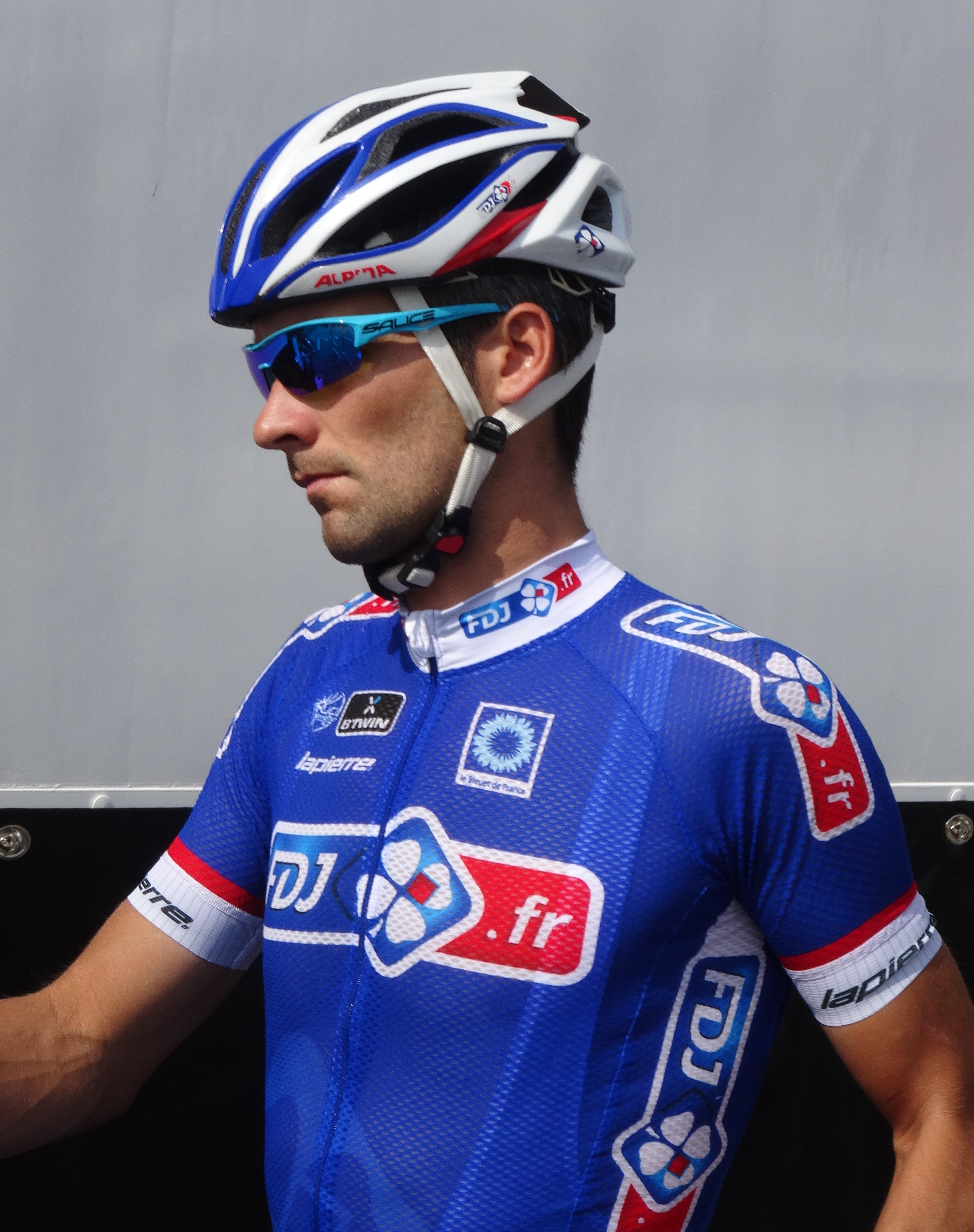 Reportage photographique réalisé le dimanche 27 juillet à l'occasion du départ de la deuxième étape du Tour de Wallonie 2014 à Péronnes-lez-Antoing (Antoing), Belgique.